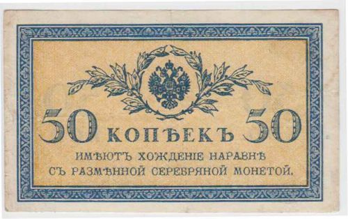 Музей: Гродзенскі дзяржаўны гісторыка-археалагічны музей Тып: рэчавыя помнікі Від: баністыка Прадметнае імя: білет казначэйскі Назва/аўтарская назва: "50 копъекъ" Матэрыялы: папера; Тэхналогіі стварэння: друк; Дата стварэння: 1915 г. Месца стварэння: Расійская Імперыя Памеры: 60 х 100 мм